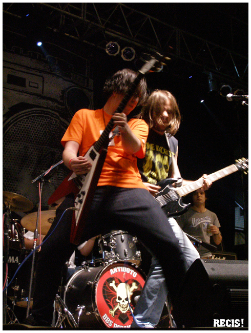 Tr3s de Corazón, grupo de punk originario de Medellín, Colombia. Presentación en el Family Day Festival, Buenos Aires, Argentina